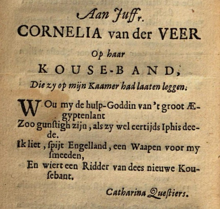 Gedicht 'Op haar kouseband' van Catharina Questiers. In: "Lauwer-stryt tusschen Catharina Questiers en Cornelia van der Veer; met eenige Bij-dichten aan, en van haar geschreeven" (Amsterdam, Adriaen Venendael, 1665). Dichtwisseling tussen twee zeventiende-eeuwse dichteressen. Ook: Lauwerstrijd, Lauwerstryd, Lauwerstryt, kousenband.